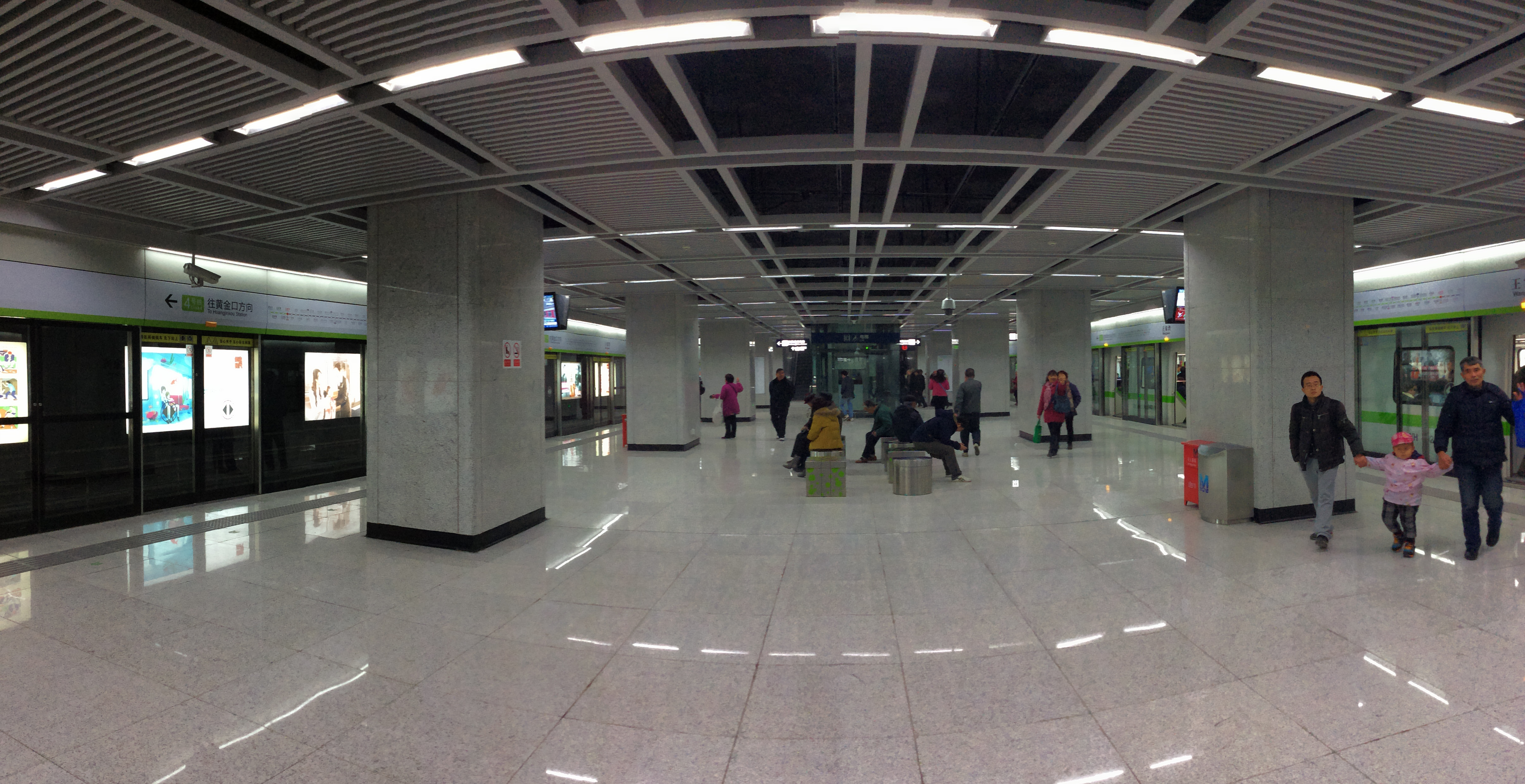 中文（中国大陆）: 王家湾站站台